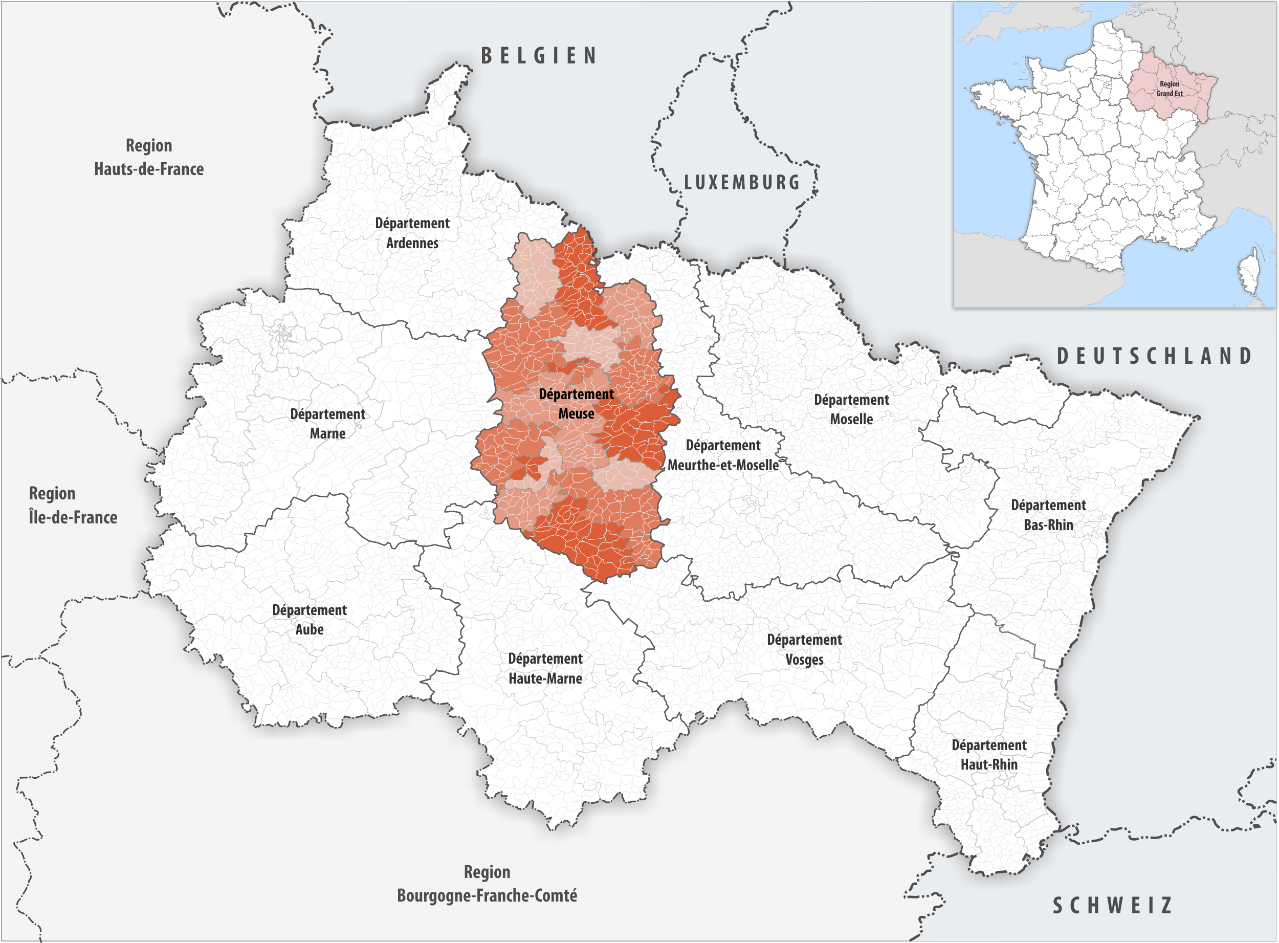 Lage des Departements Meuse